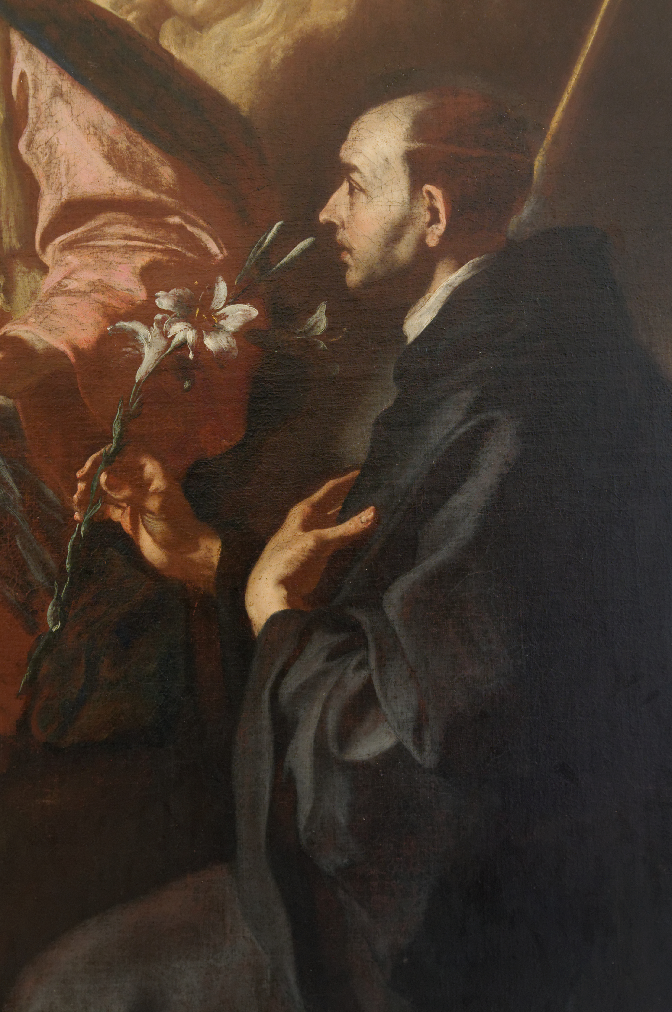 detail: St Maurus